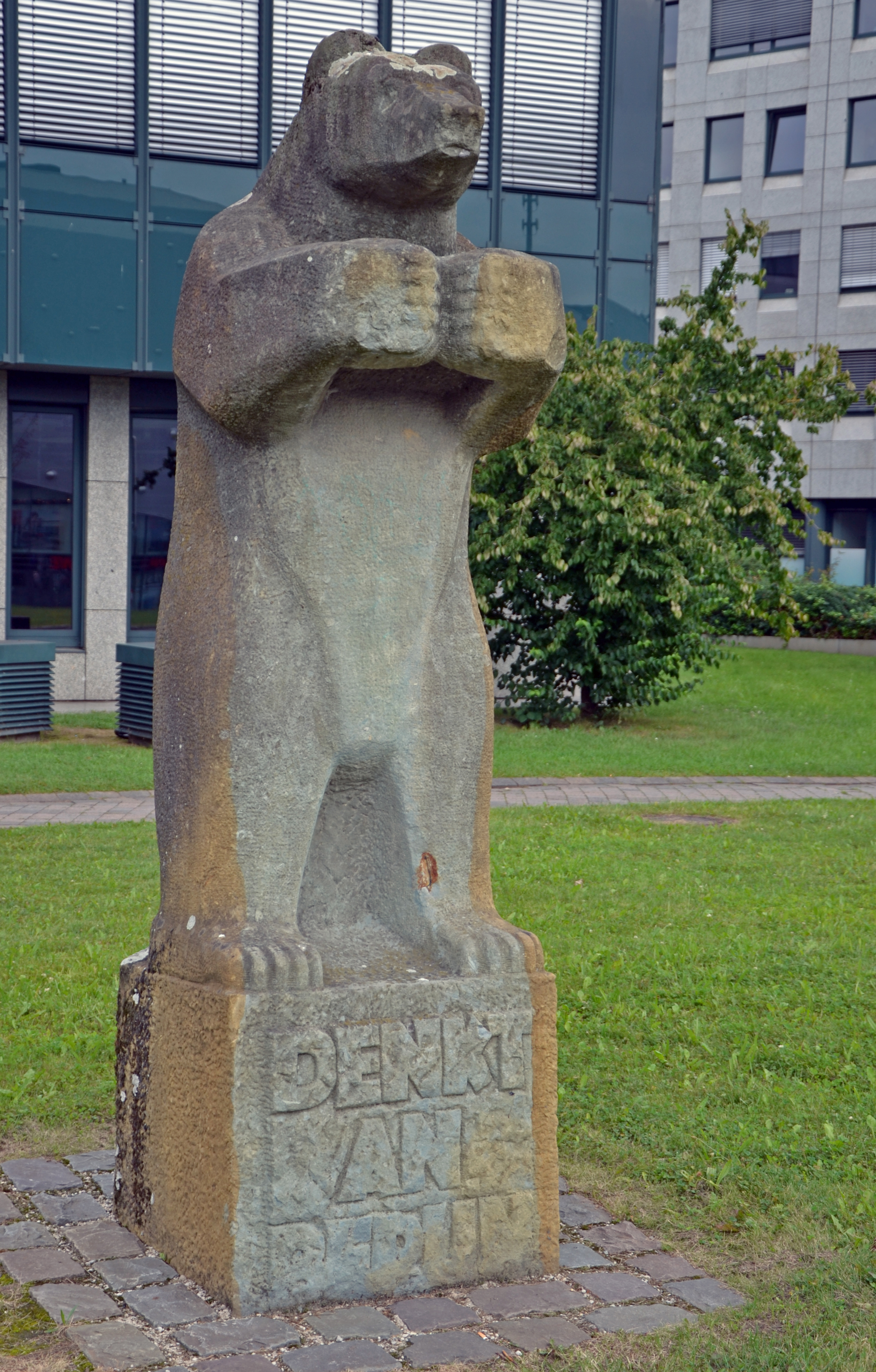 Die vom Bildhauer Herbert Lungwitz erschaffene, knapp drei Meter hohe Skulptur des Berliner Bären aus Anröchter Dolomit, die seit 1959 im Grugapark stand, wurde am 10. Juli 1964 am nun Berliner Platz genannten Kreisverkehr im Essener Stadtkern aufgestellt. In seinen steinernen Sockel sind die Worte "Denkt an Berlin" geprägt.